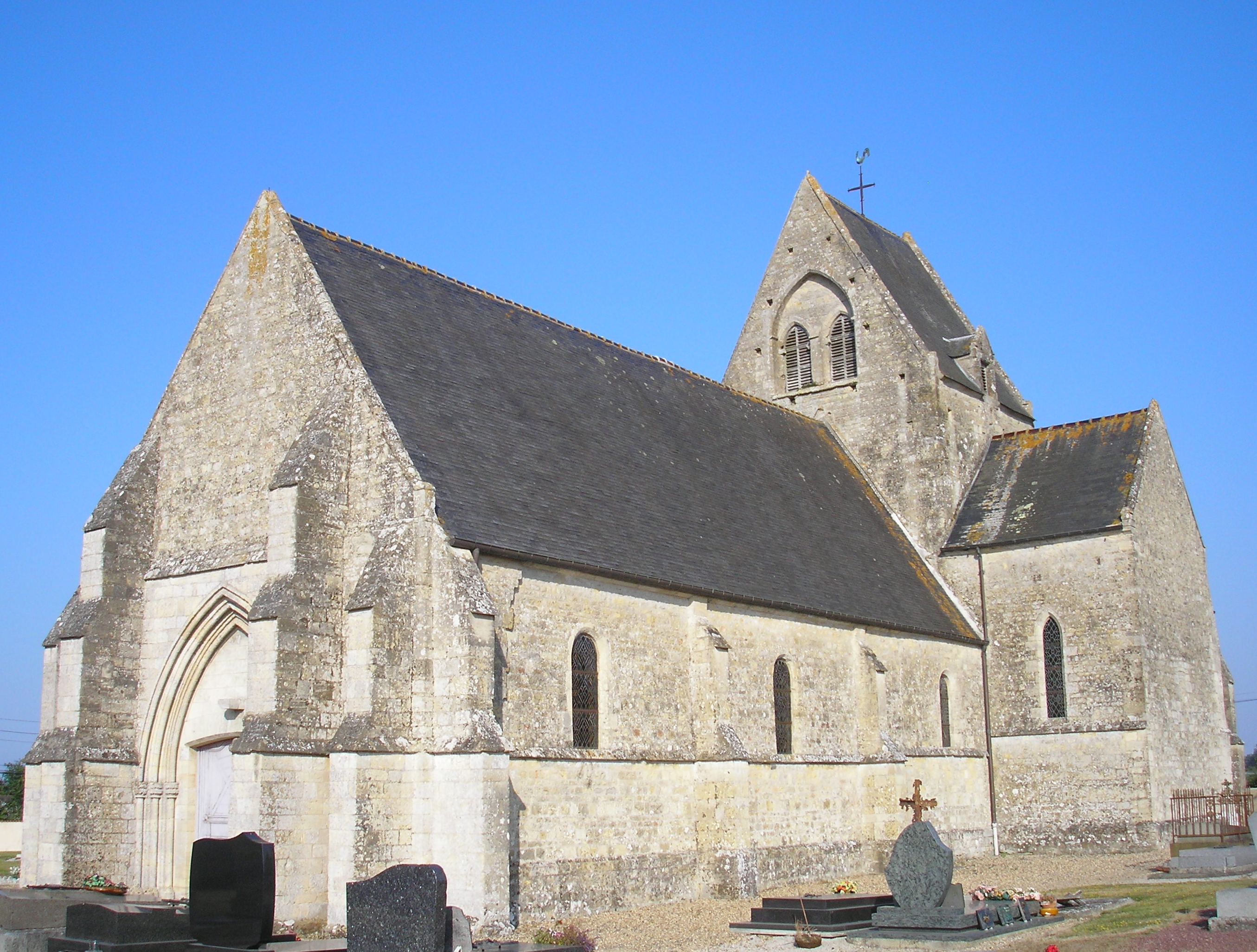 Cricqueville-en-Bessin (Normandie, France). L'église Notre-Dame.